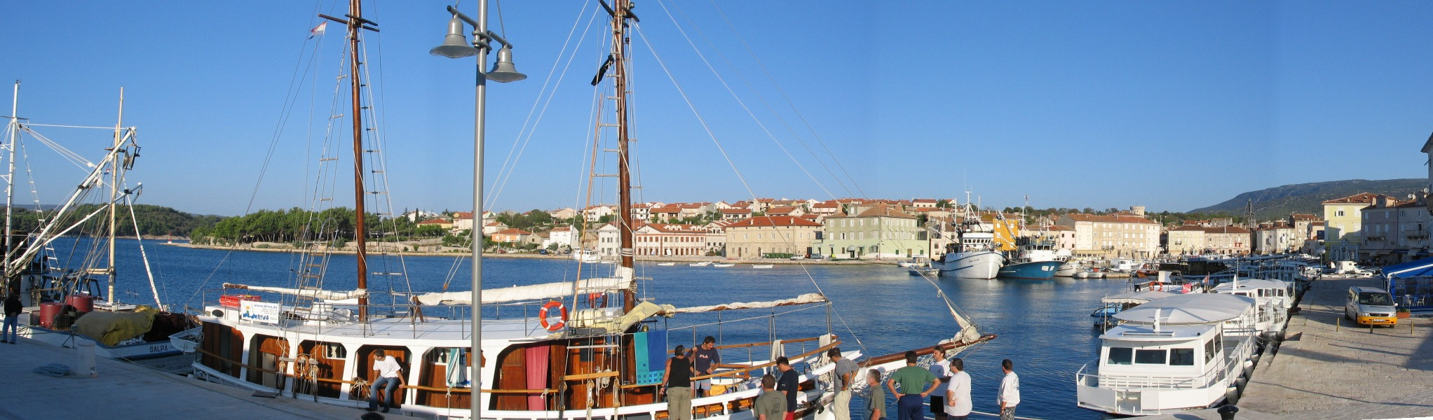 Der Hafen der Stadt Cres aufgenommen von Bord des Linienschiffs "Judita", das auf der schnellen Schiffslinie (es handelt sich um einen Katamaran) Mali Lošinj-Unije-Martinšćica-Cres-Rijeka verkehrt.